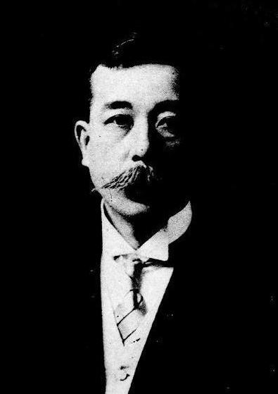 山田寅次郎